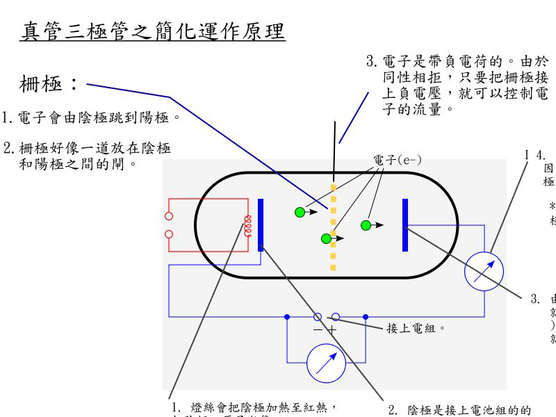 真空三極管之原理